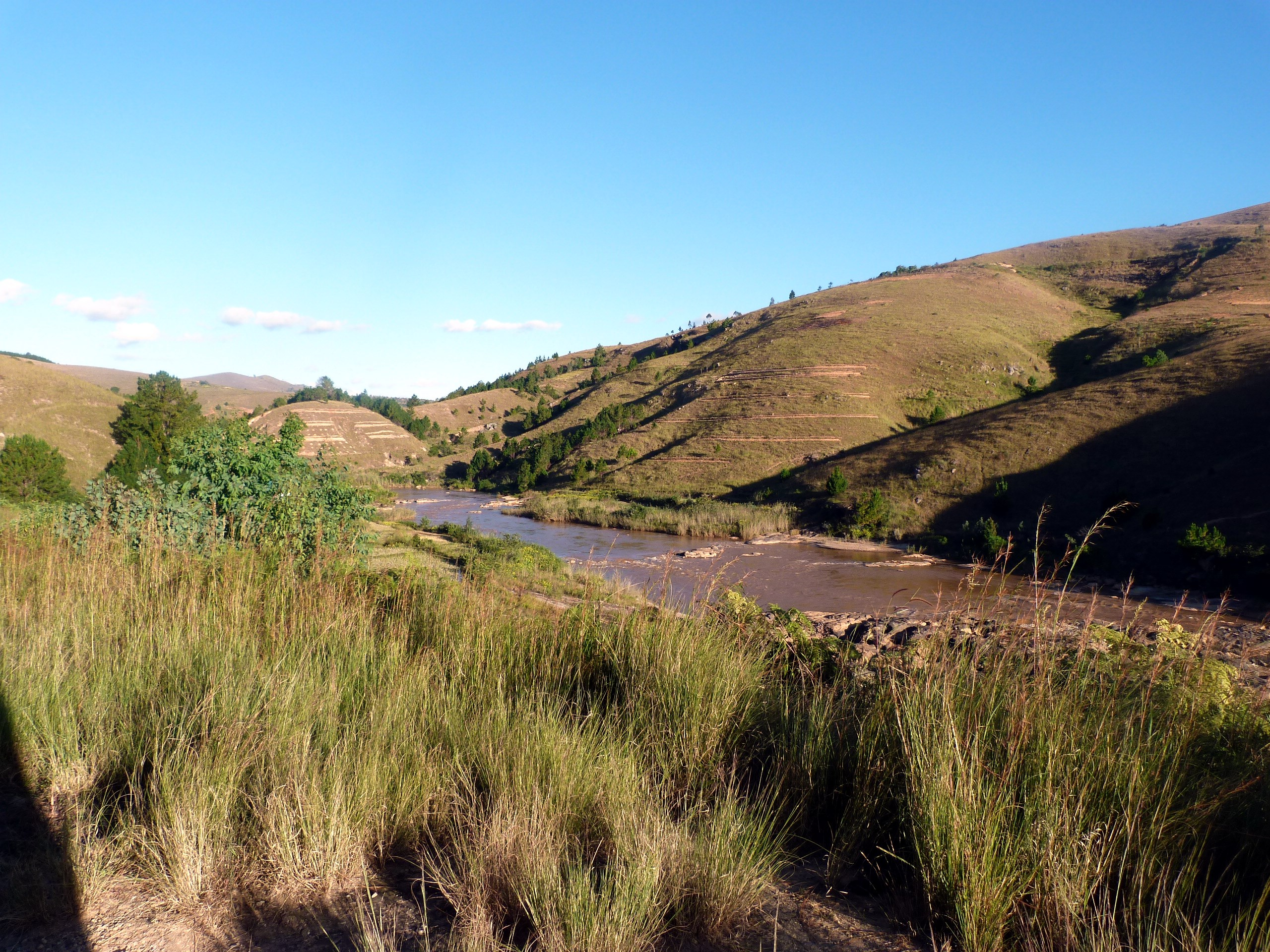 La rivière Mania, Madagascar.